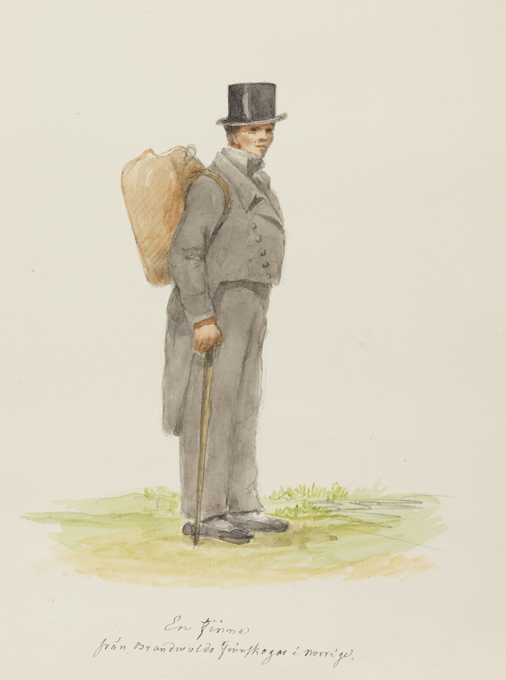 Metsäsuomalainen Ruotsista tai Norjasta 1800-luvun alussa